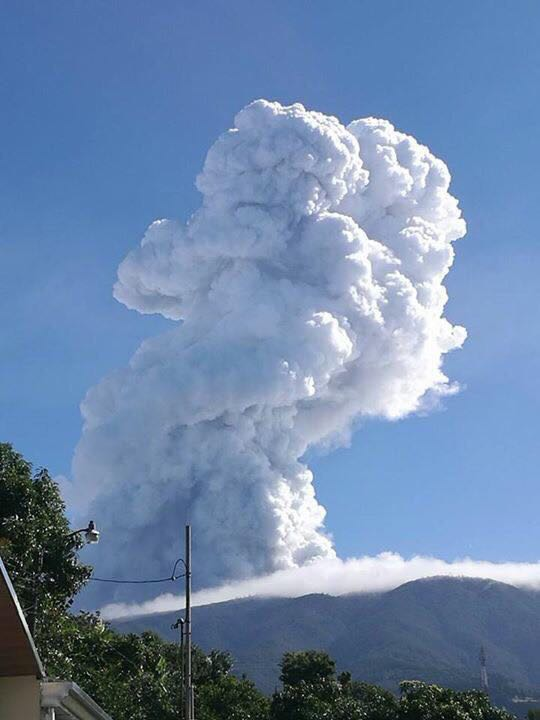 Erupción del volcán Póas, Costa Rica, del 12 de abril de 2017.